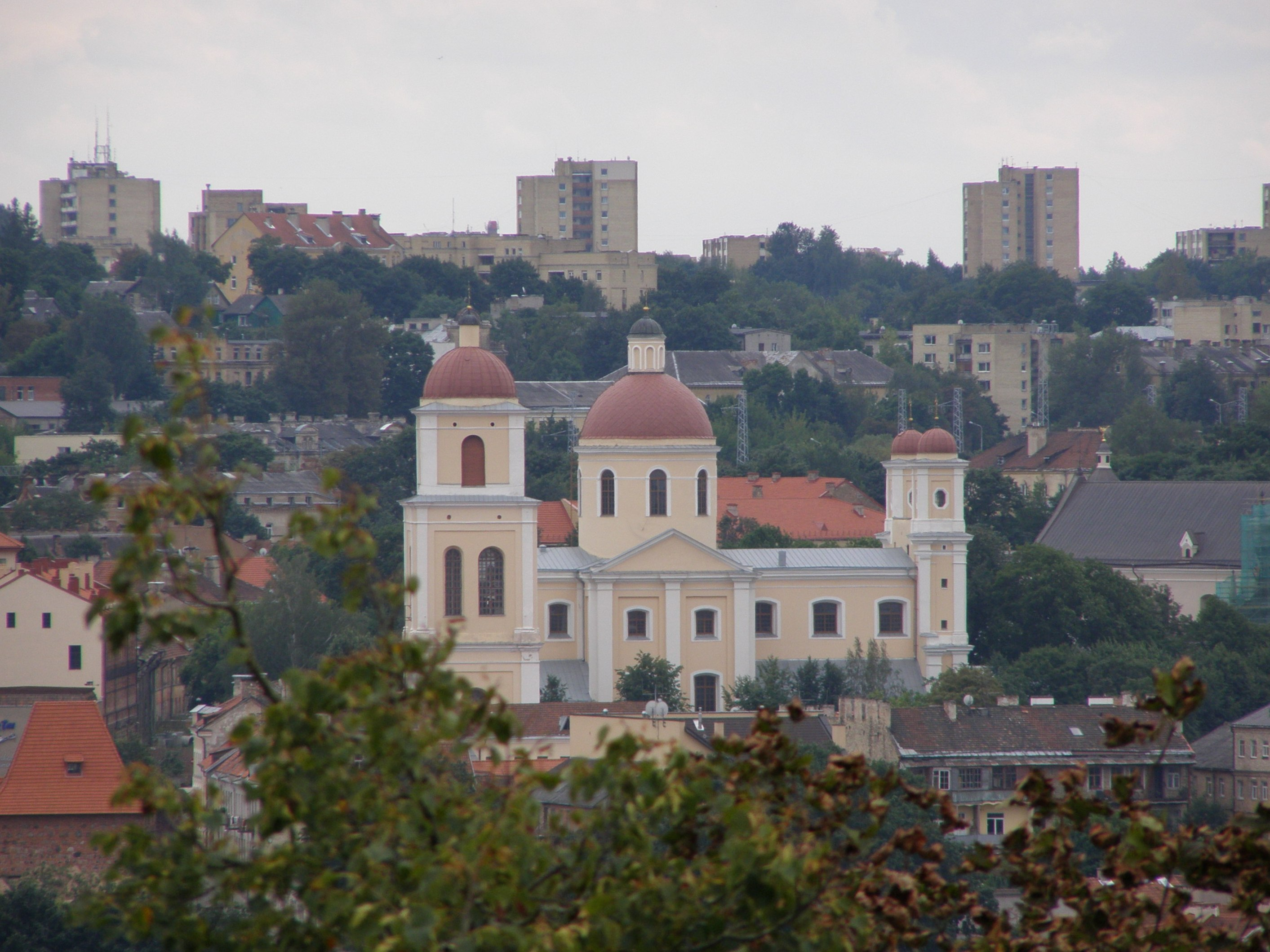 Cerkiew Św. Ducha w Wilnie